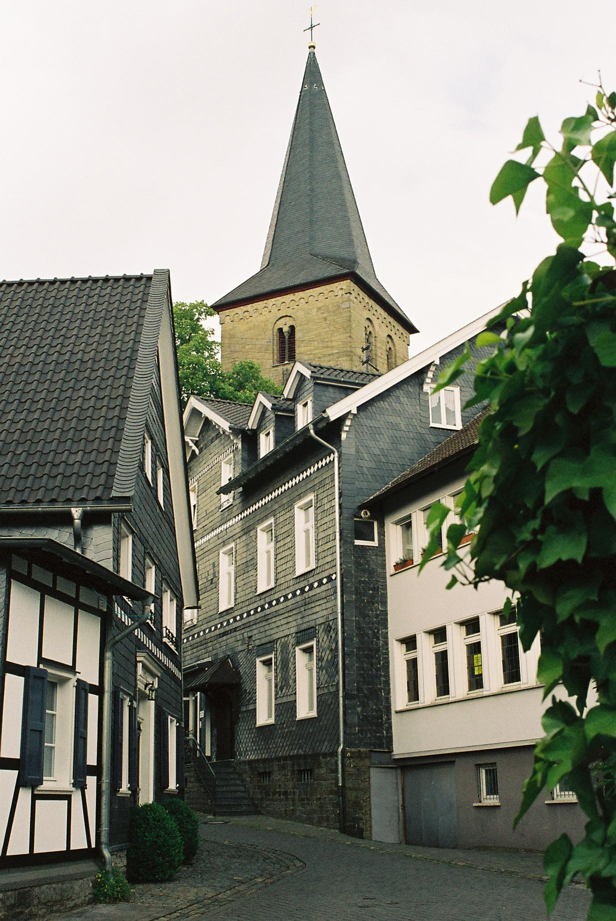 Burgstraße in Ruppichteroth, im Hintergrund Turm der kath. Pfarrkirche St. Severin